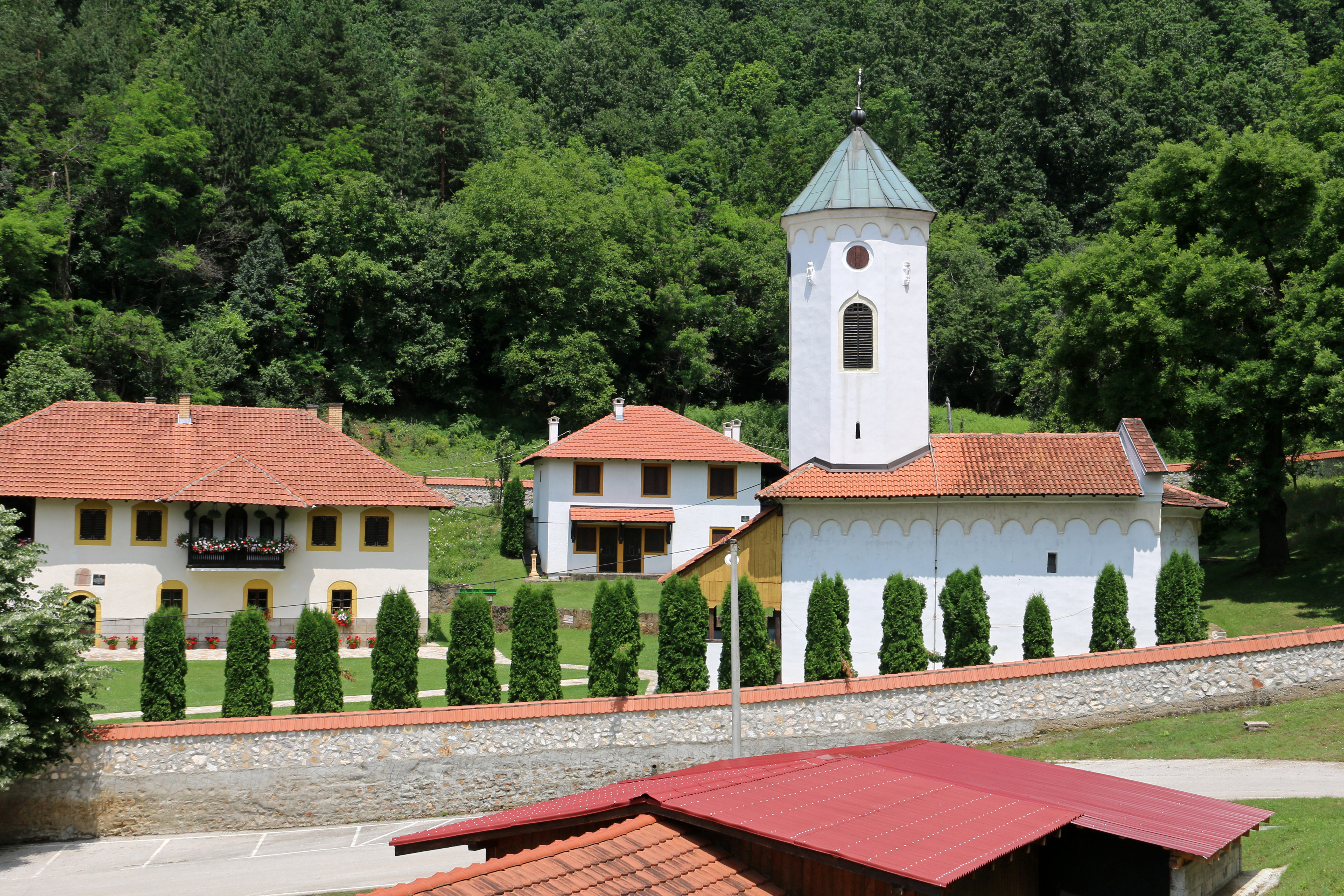 Manastir Vujan